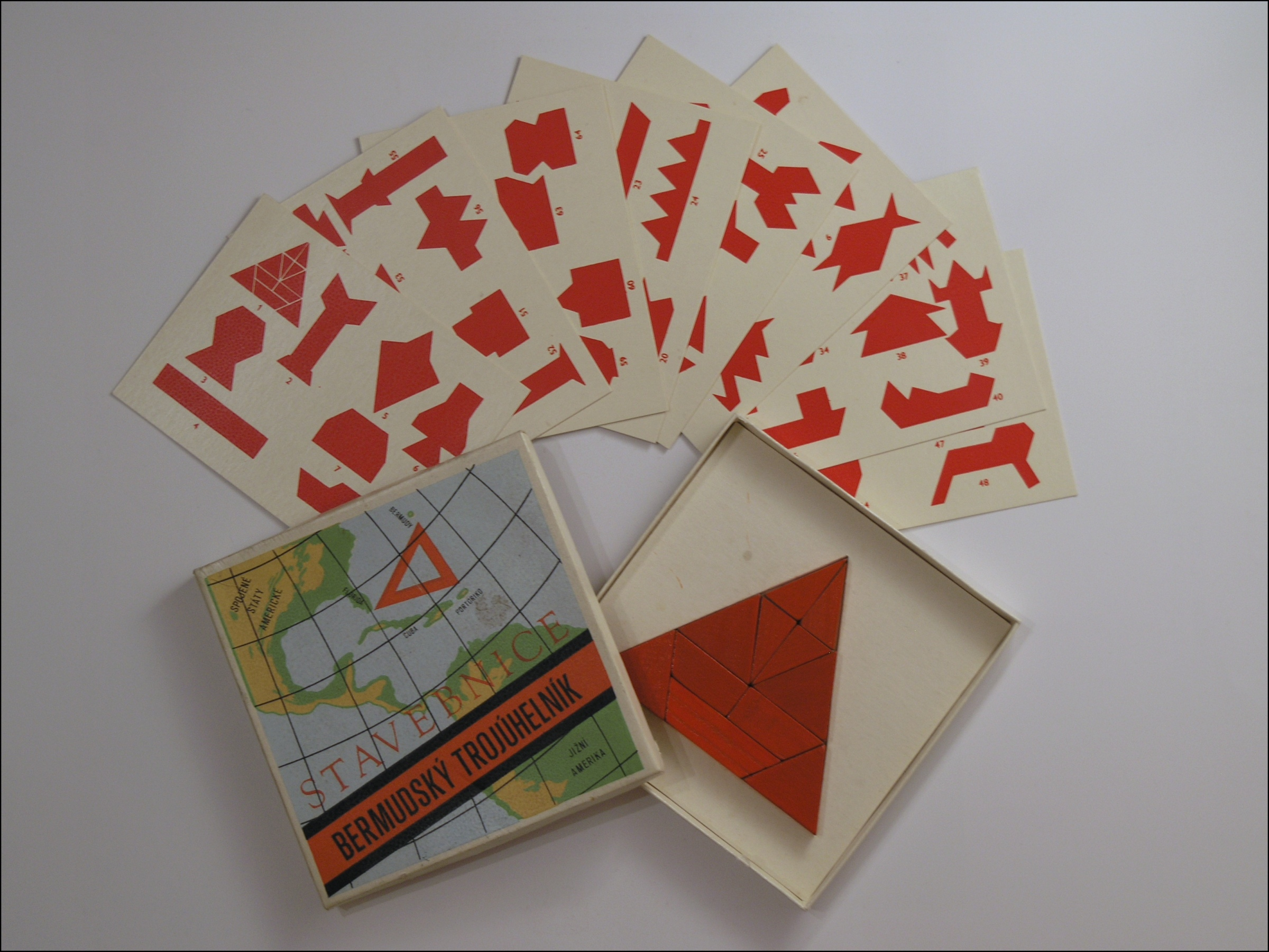 Tangram Bermudský trojúhelník